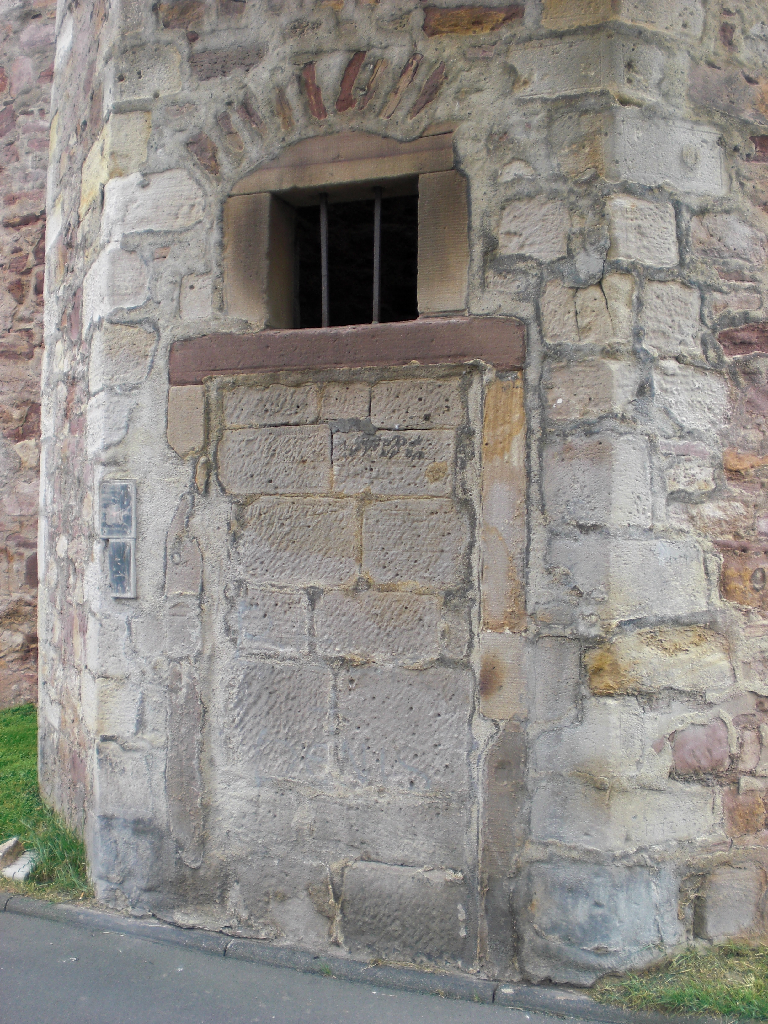 Die Pforte am Westturm des Kasseler Zeughauses